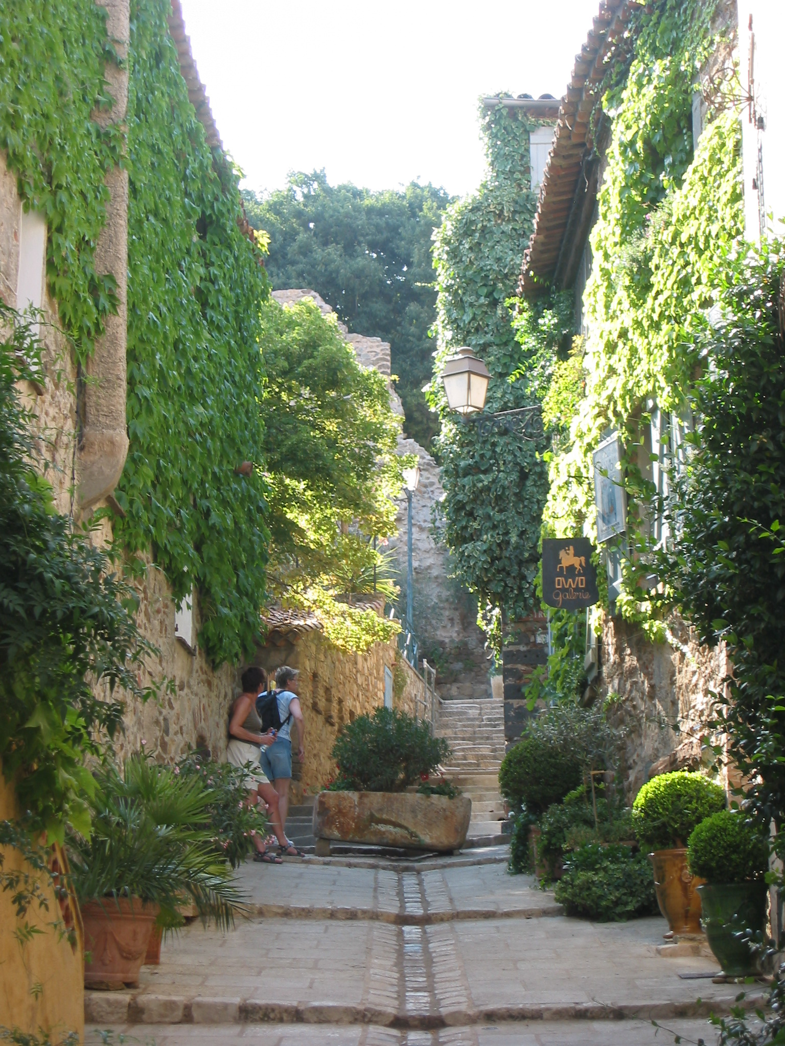 Grimaud, Var, France La rue pour monter au château 5 juillet 2006 Author : civodule